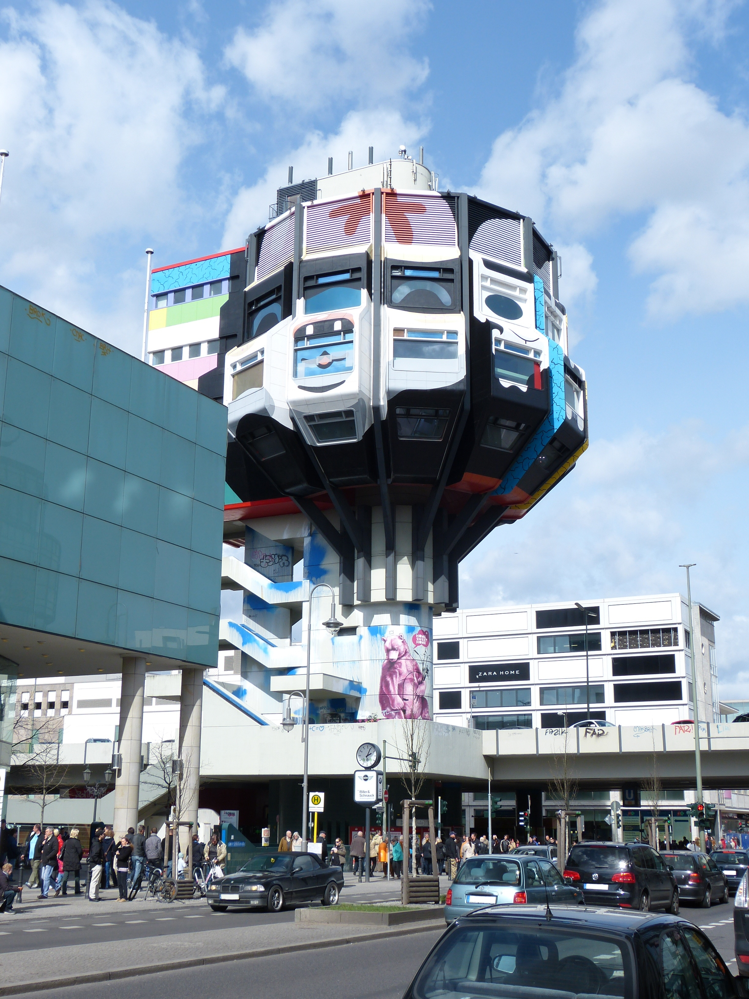 Berlin-Steglitz, Bierpinsel, Blick von Südosten (von Schloßstraße)